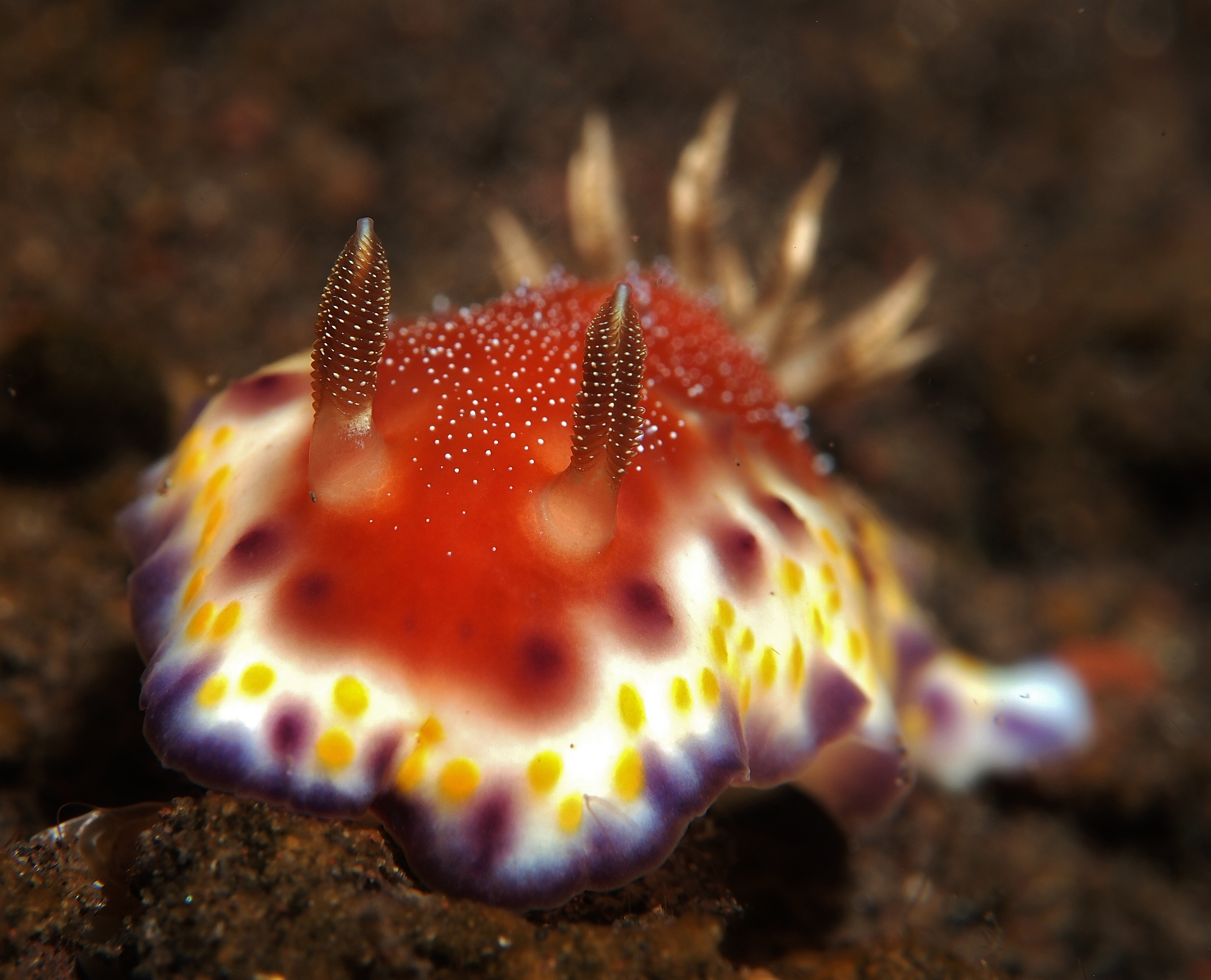 Goniobranchus collingwoodi, Tulamben, Bali, Indonesia